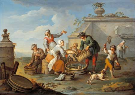 Fischmarkt